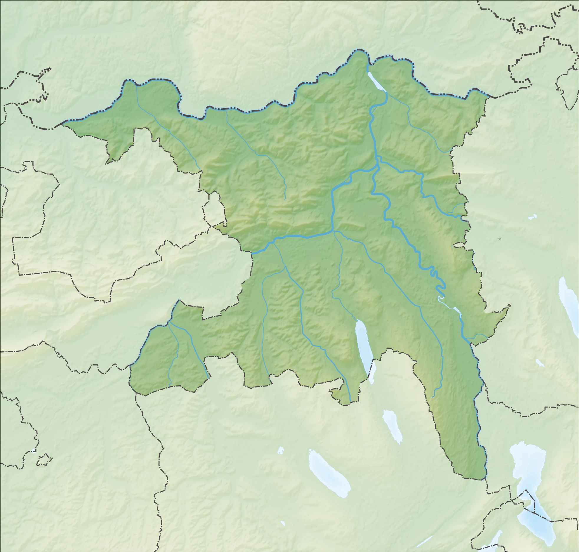 Reliefkarte des Kantons Aargau Topographischer Hintergrund: NASA Shuttle Radar Topography Mission (public domain). SRTM3 v.2.